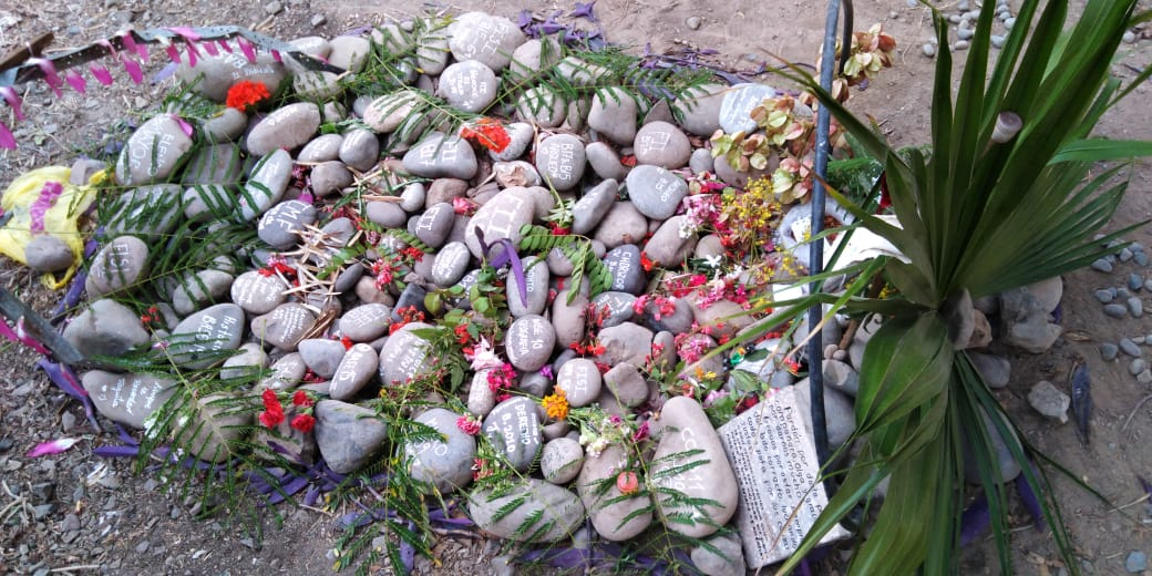 Tumba de la Mascota de la Universidad Nacional Mayor de San Marcos conocida como "Perrovaca".